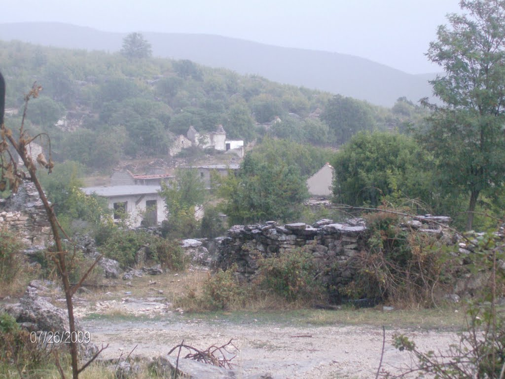 Medviđa